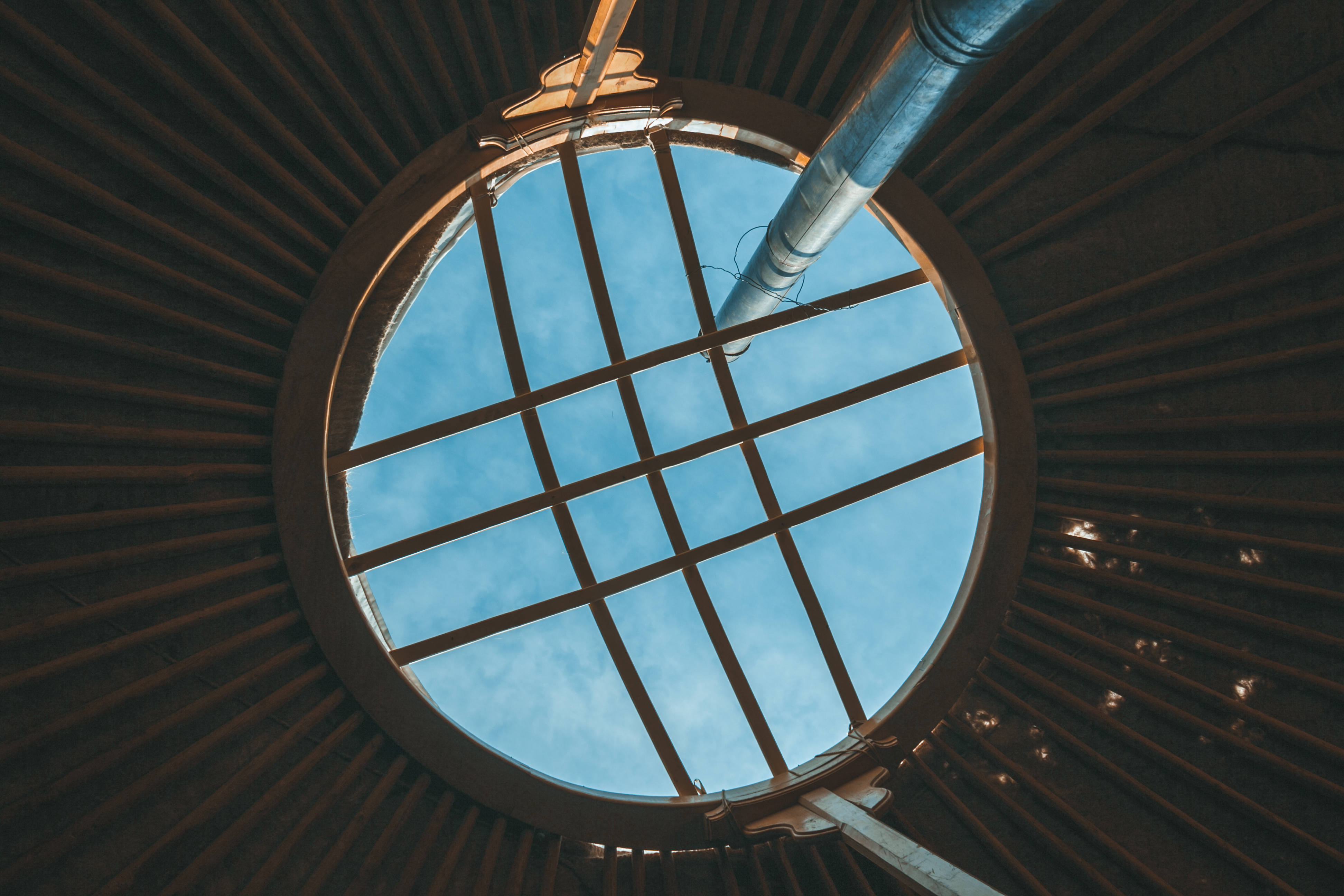 Тувинская юрта